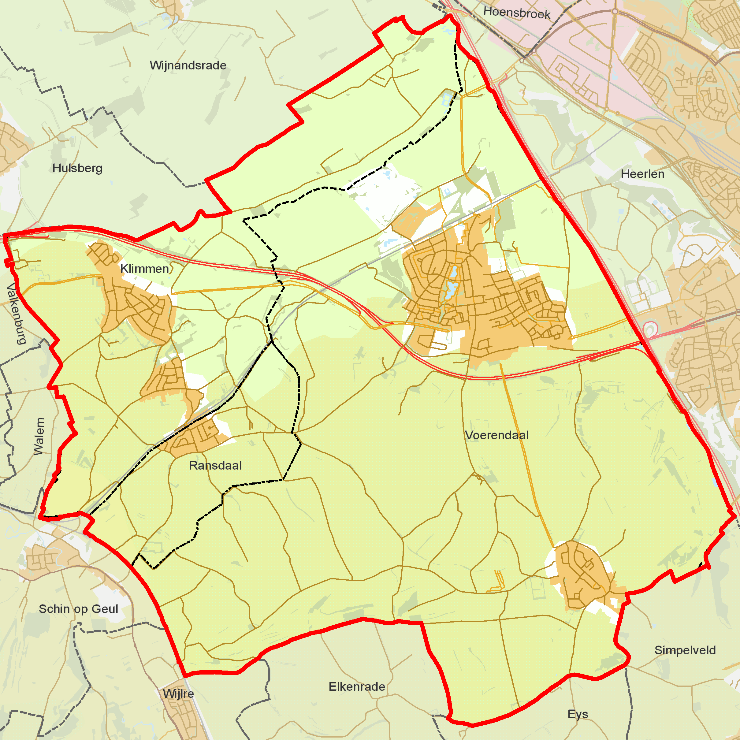 BAG woonplaatsen - Gemeente Voerendaal.png